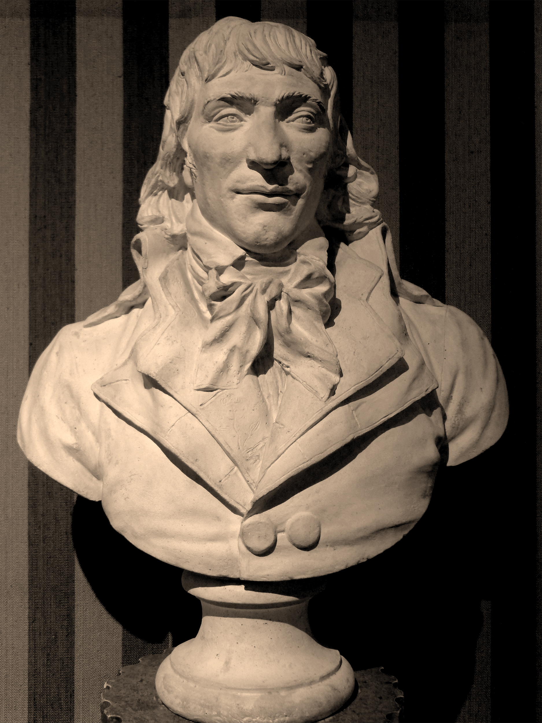 Portrait de Camille Desmoulins.